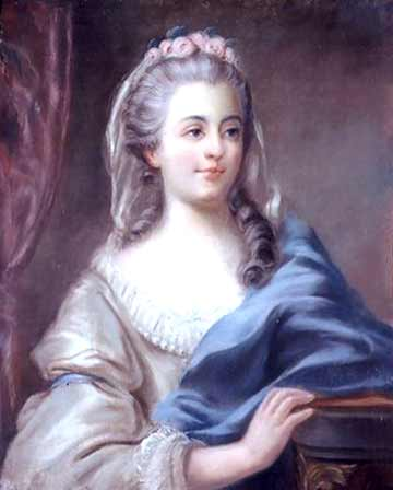 Louise Contat, (1760-1813), actrice de la Comédie-Française dans le rôle de Suzanne